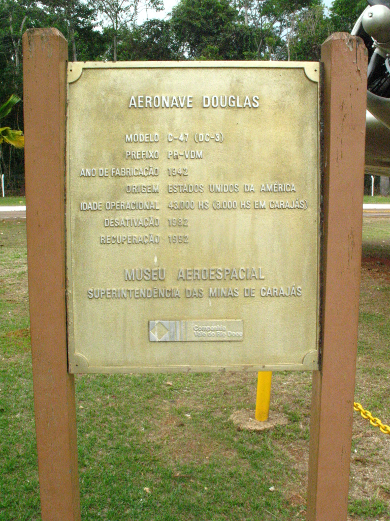 Placa sobre a aeronave Douglas.